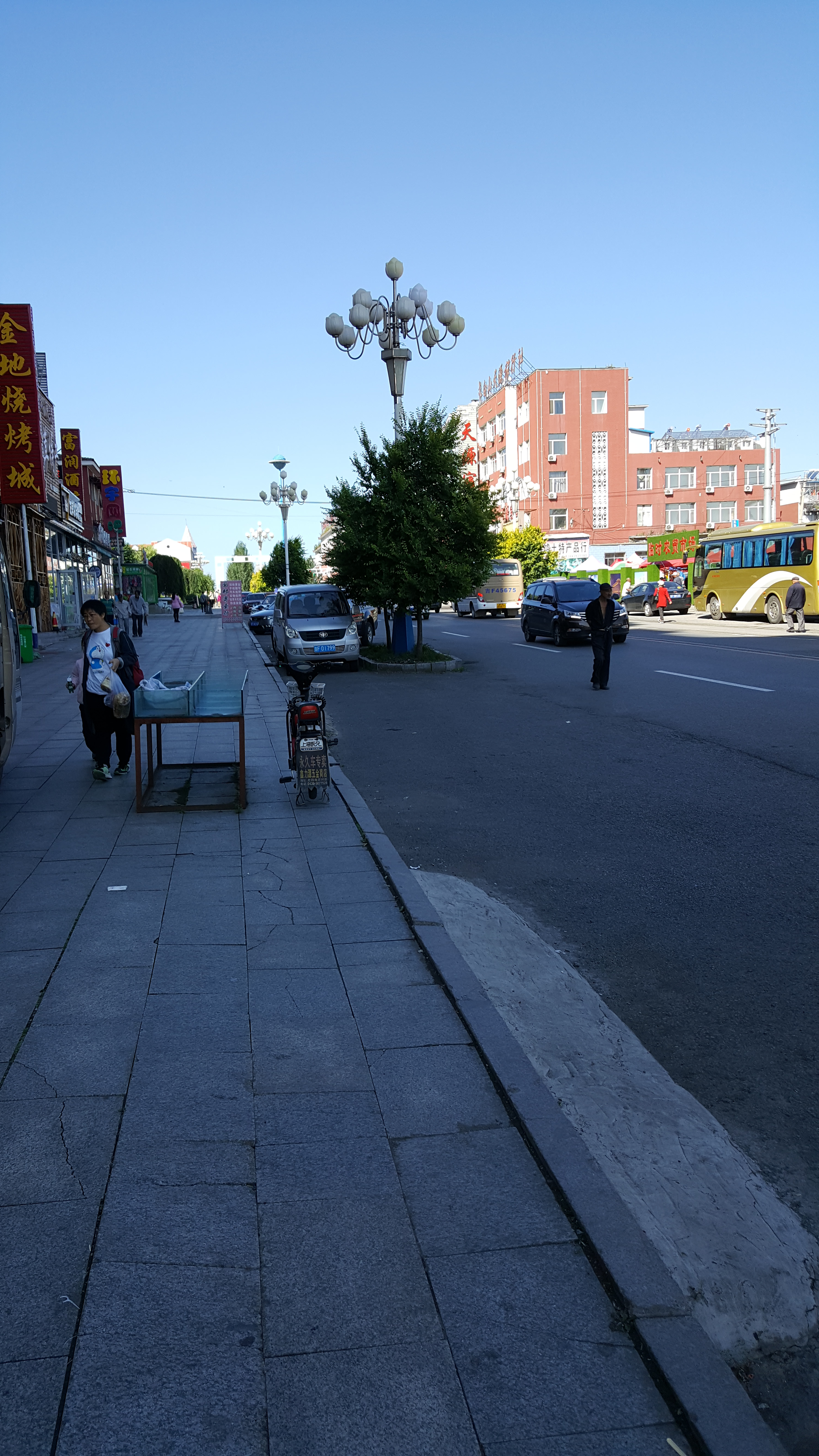 中文（中国大陆）: 松江河镇街景